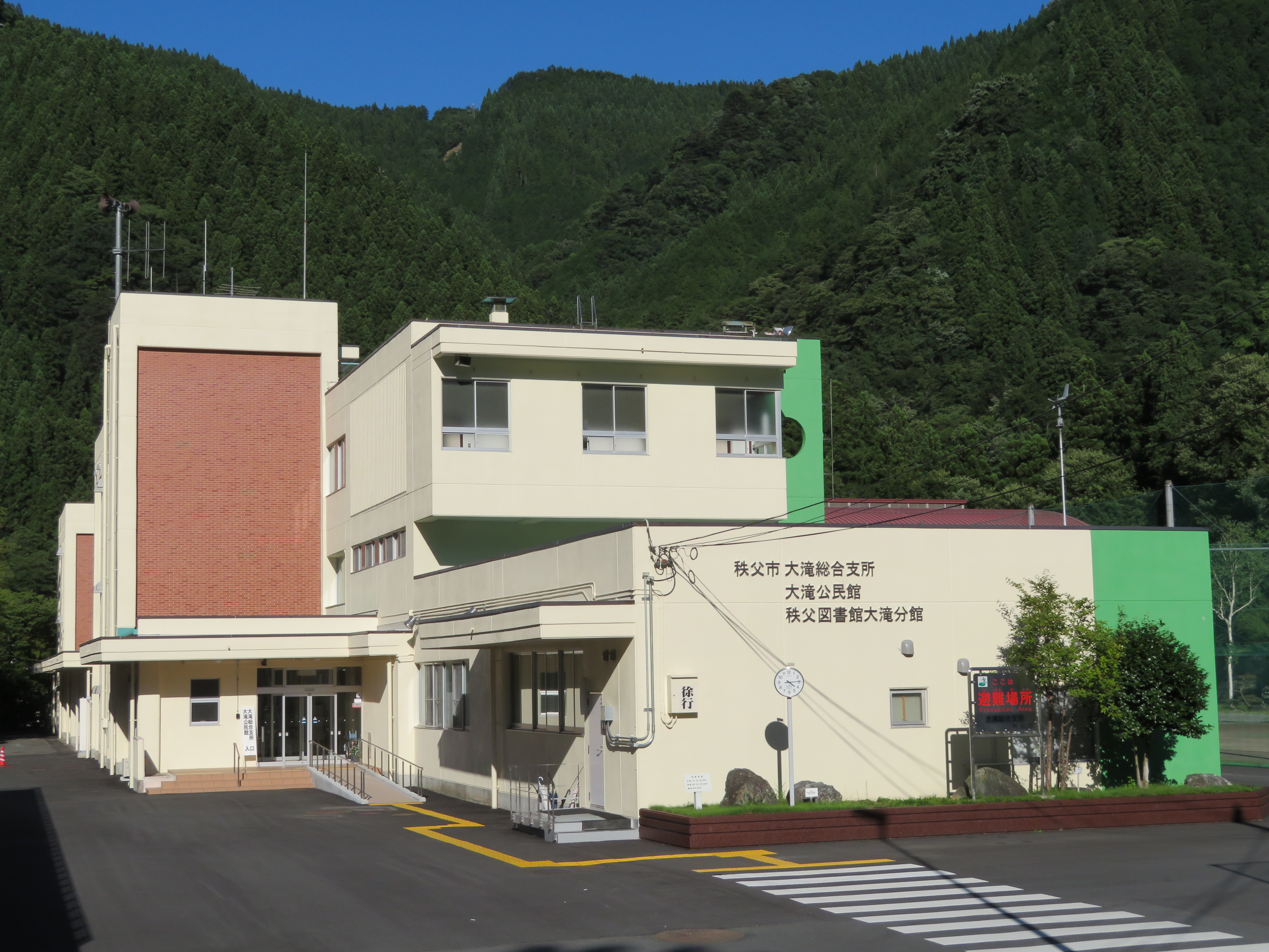 秩父市大滝総合支所、秩父図書館大滝分館、大滝公民館建物（旧秩父市立大滝中学校校舎） Canon PowerShot SX720 HS